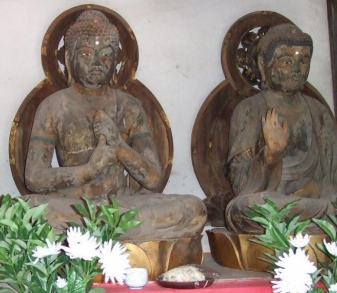 東円坊の二尊